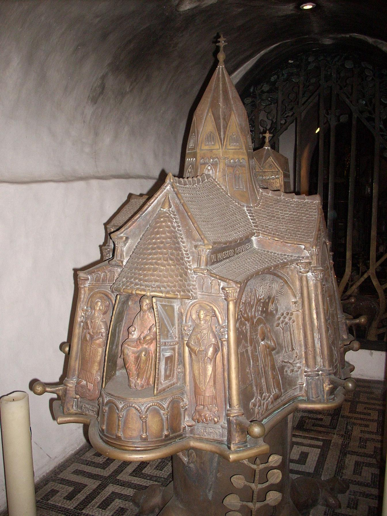 Essen-Werden, Ludgerusbasilika, Krypta, Schrein des hl. Liudger